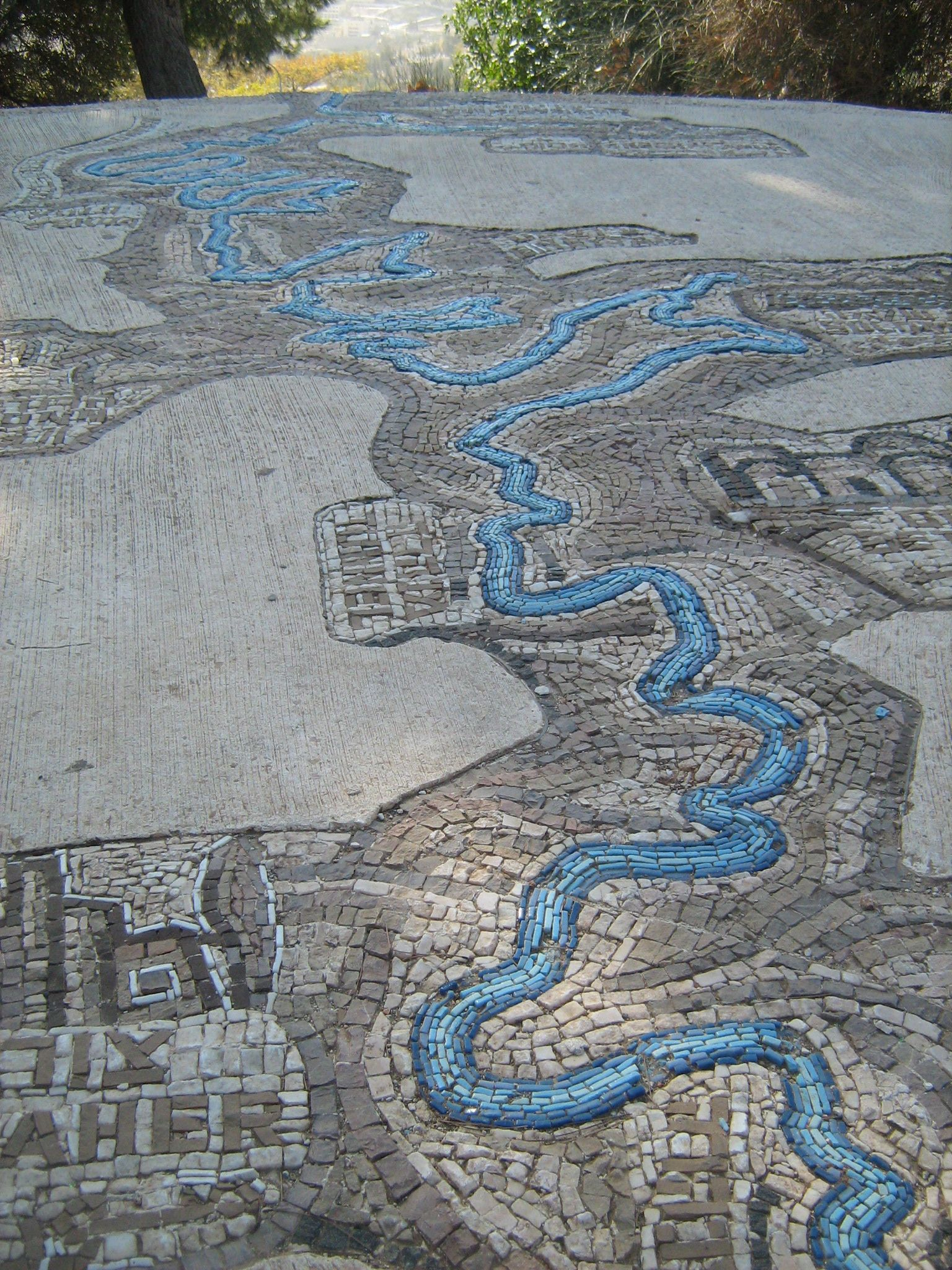 פיר מספר שלוש באמה התחתונה מתחת לארמון הנציב